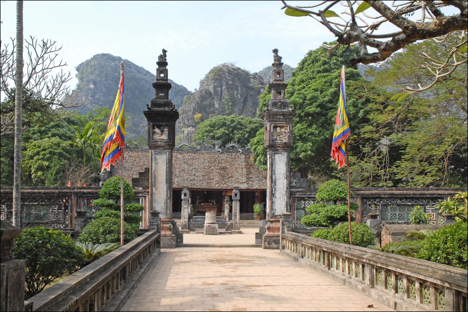 Hoa Lu fut la capitale du Vietnam indépendant de 968 à 979, avant d’être abandonnée au profit de Thang Long - Hanoi. Le roi Dinh Tien Hoang y avait fait construire son palais protégé par les montagnes de la baie d'Halong Terrestre et par la rivière Van. Un temple commémoratif lui rend hommage.